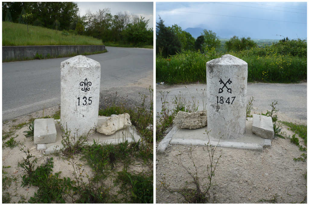 Cippo di confine tra lo Stato Pontificio e il Regno delle Due Sicilie tra i comuni di San Giovanni Incarico e Falvaterra, in provincia di Frosinone